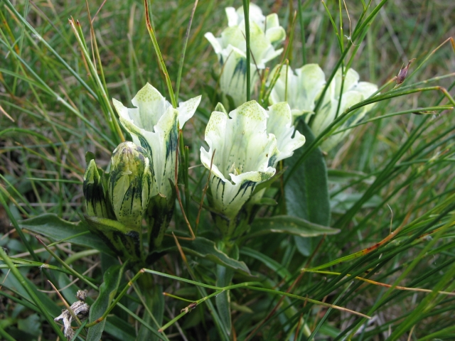 Goryczka przezroczysta; zdjęcie udostępnione przez Dixi (c) 2005 na bazie GNU FDL